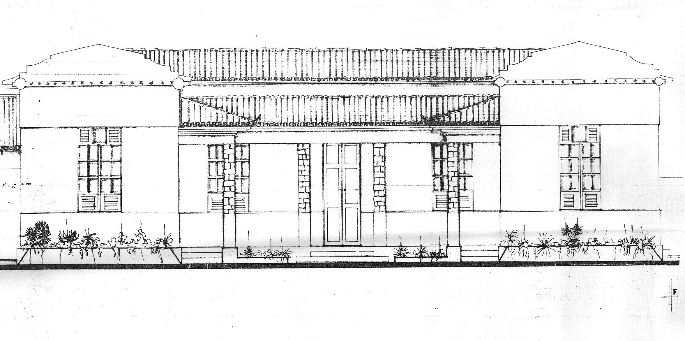 Planta frontal do palacete da higiene e saúde de Campo Maior-Piauí, atual SAAE.